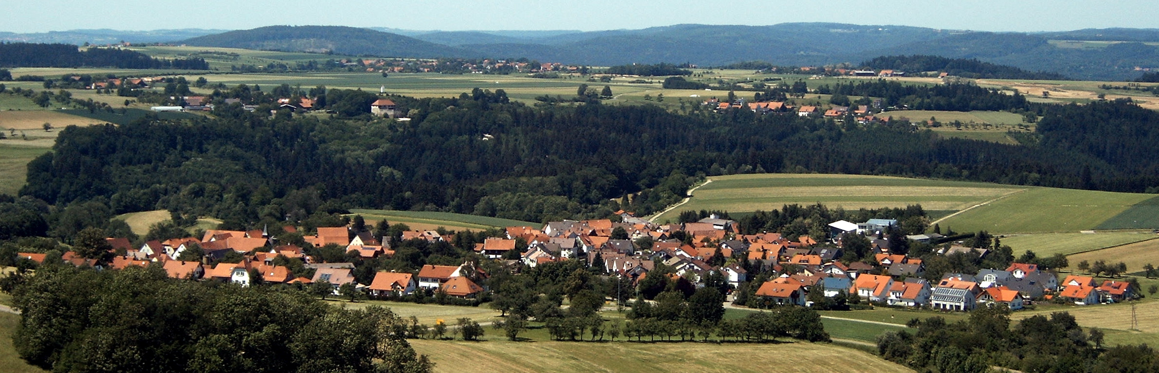 Der Ort Maitis (Göppingen), gesehen vom Aasrücken